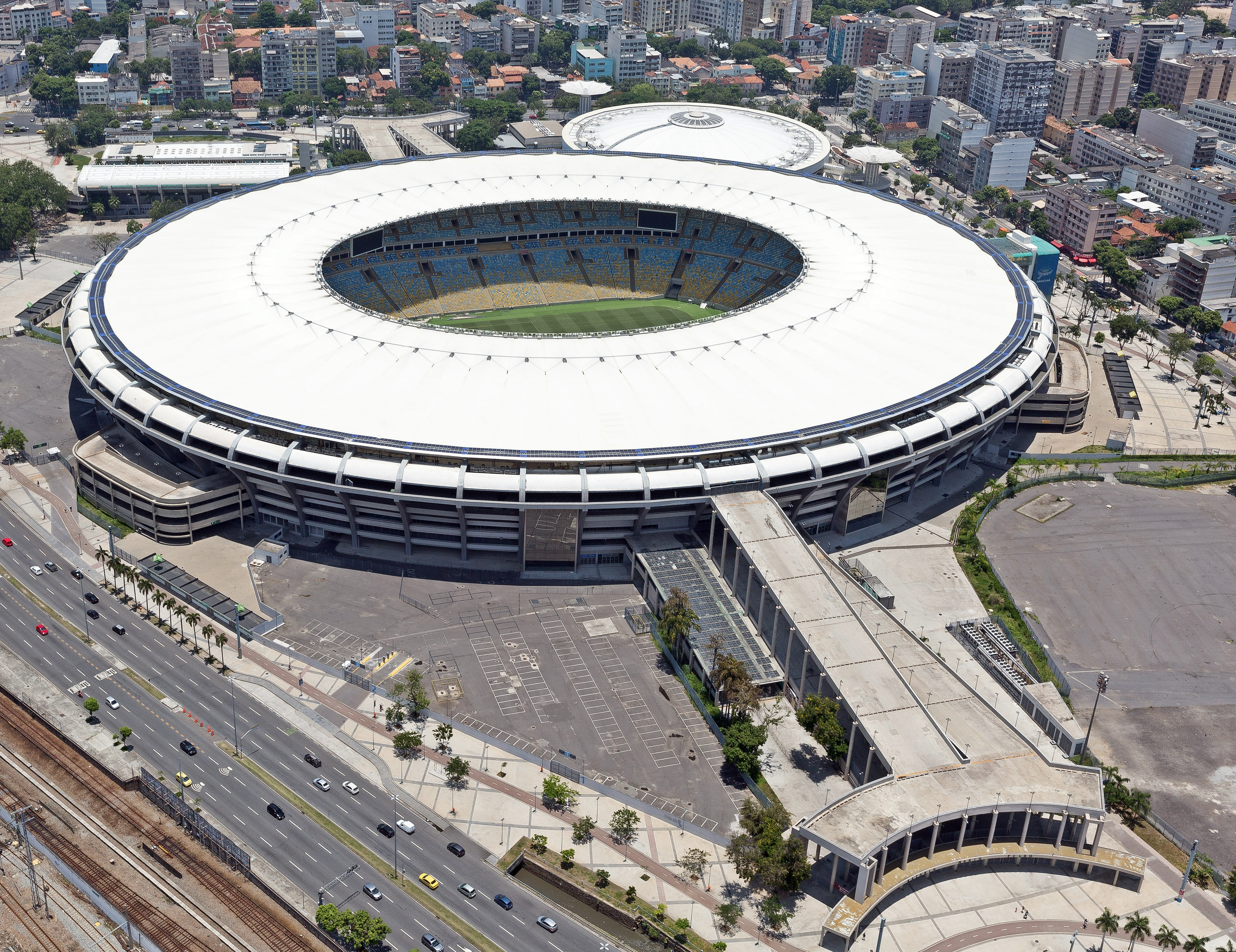 Vista aérea do estádio Maracanã, localizado na cidade do Rio de Janeiro.